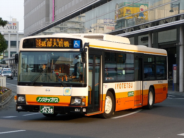 伊予鉄道ブルーリボンⅡ